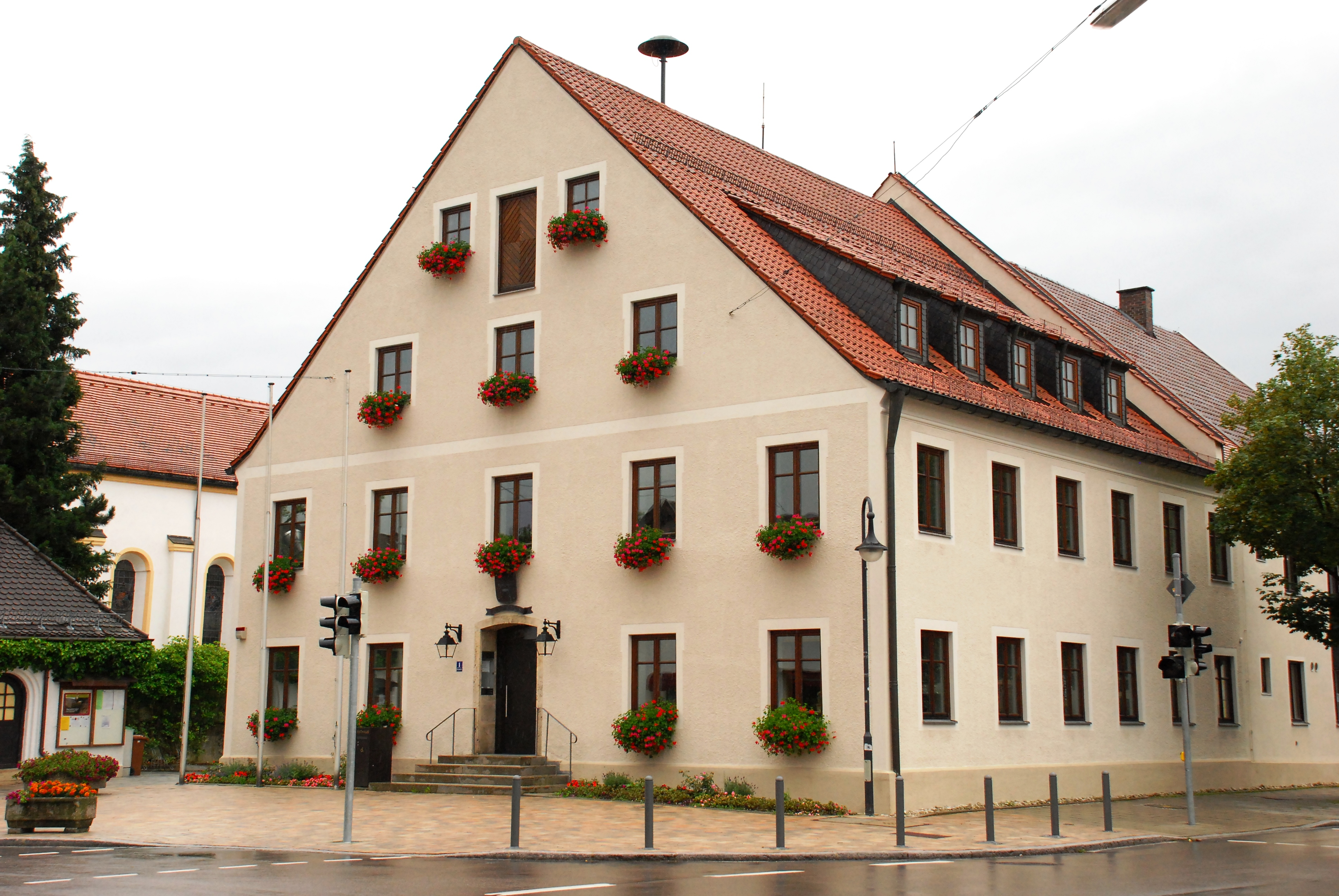 Ehemaliger Pfarrhof, dann Rathaus am Pfarrer-Wenk-Platz 1 in Hohenbrunn, Landkreis München, Regierungsbezirk Oberbayern, Bayern. Als Baudenkmal in der Bayerischen Denkmalliste unter Aktennummer D-1-84-129-2 aufgeführt. Laut Denkmalliste im Jahr 1725 erbaut.